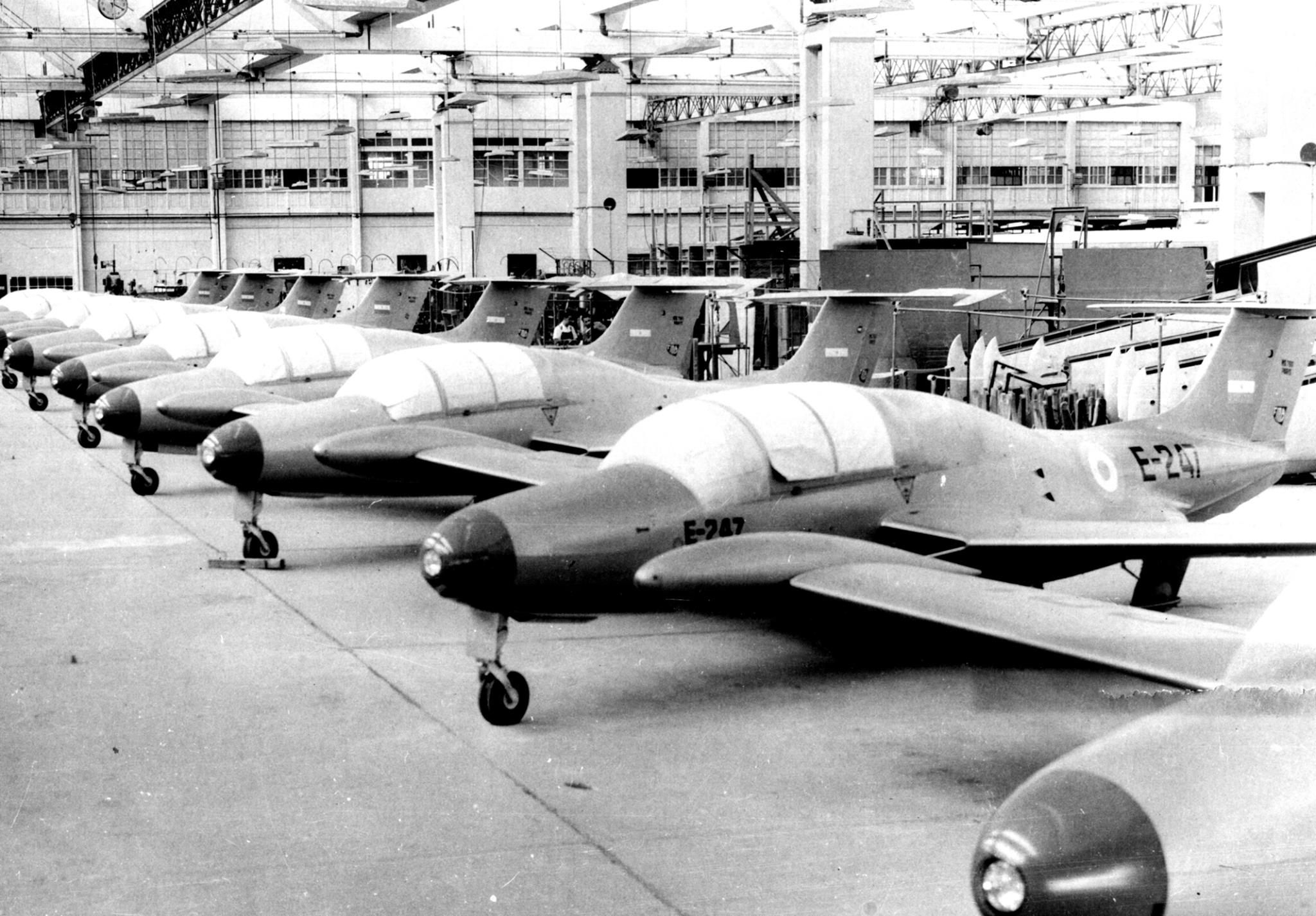 Dirección Nacional De Fabricaciones e Investigaciones Aeronáuticas (DINFIA) en la línea de producción de MS 760 e IA-46 Ranquel.jpg